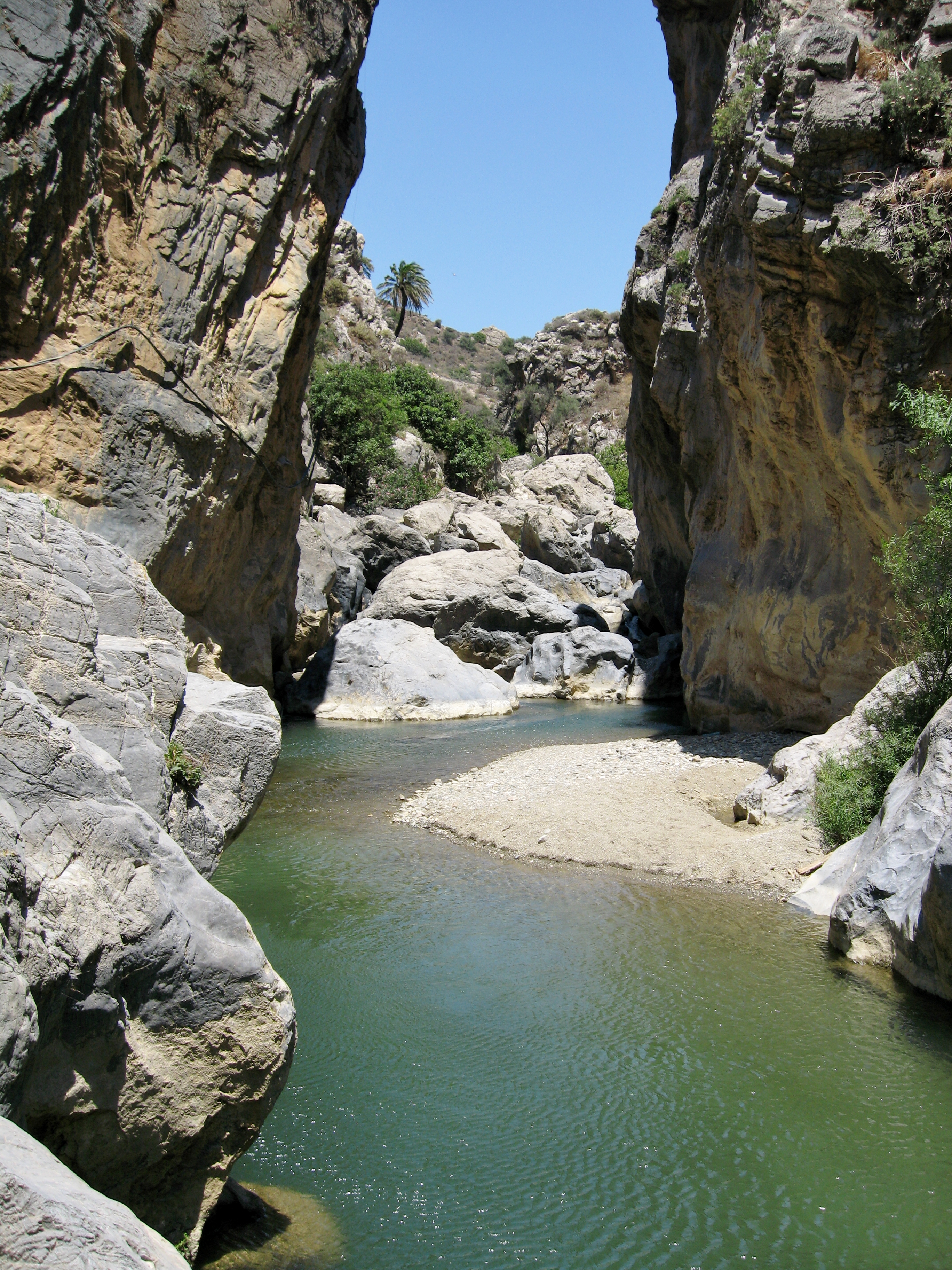 Barriere am Unterlauf des Megalopotamos (Μεγαλοπόταμος), Gemeinde Agios Vasilios, Regionalbezirk Rethymno, Kreta, Griechenland